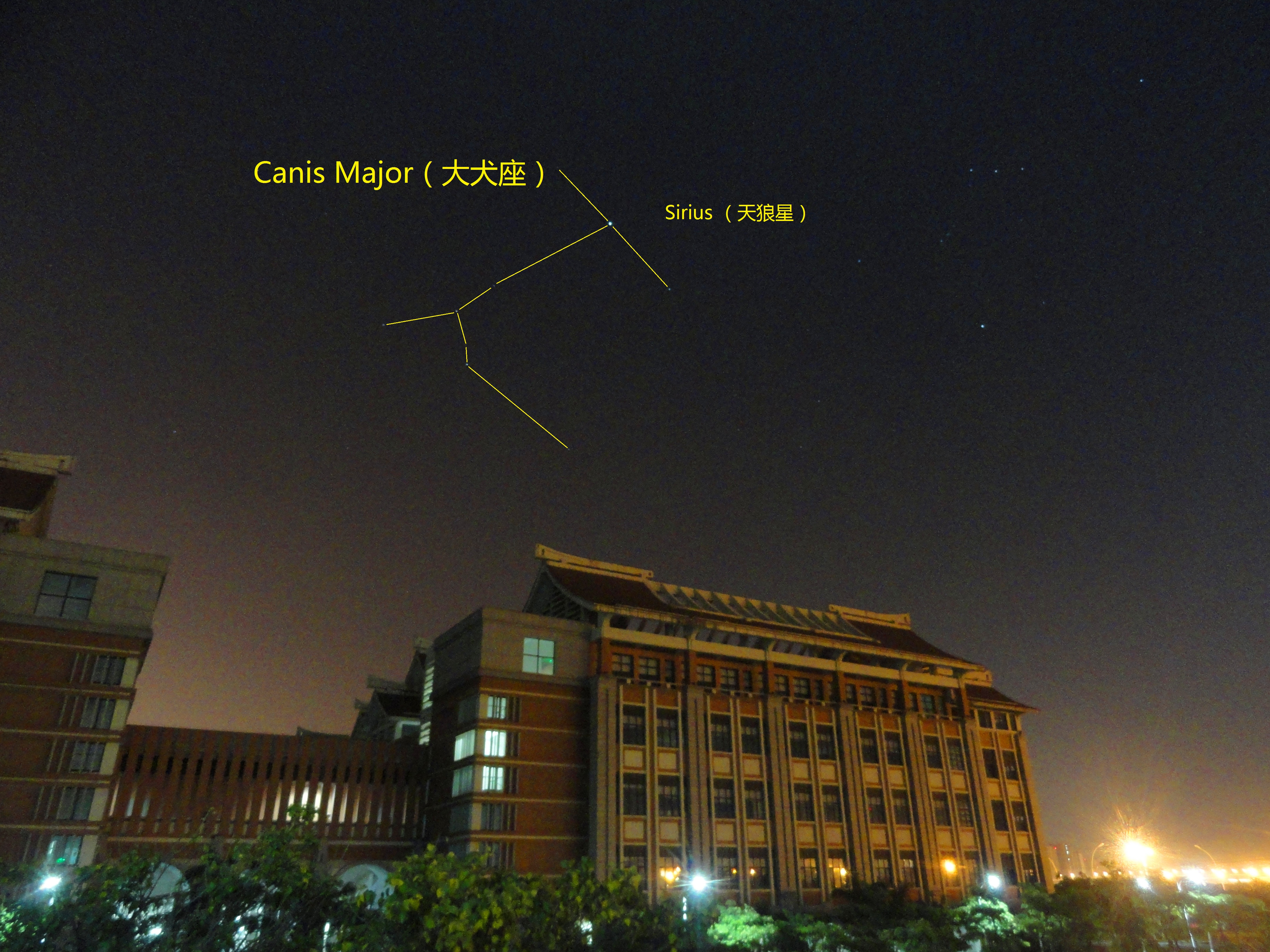 中文（中国大陆）: 2013年11月23日凌晨在集美大学校园拍摄的大犬座